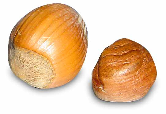 Haselnuss